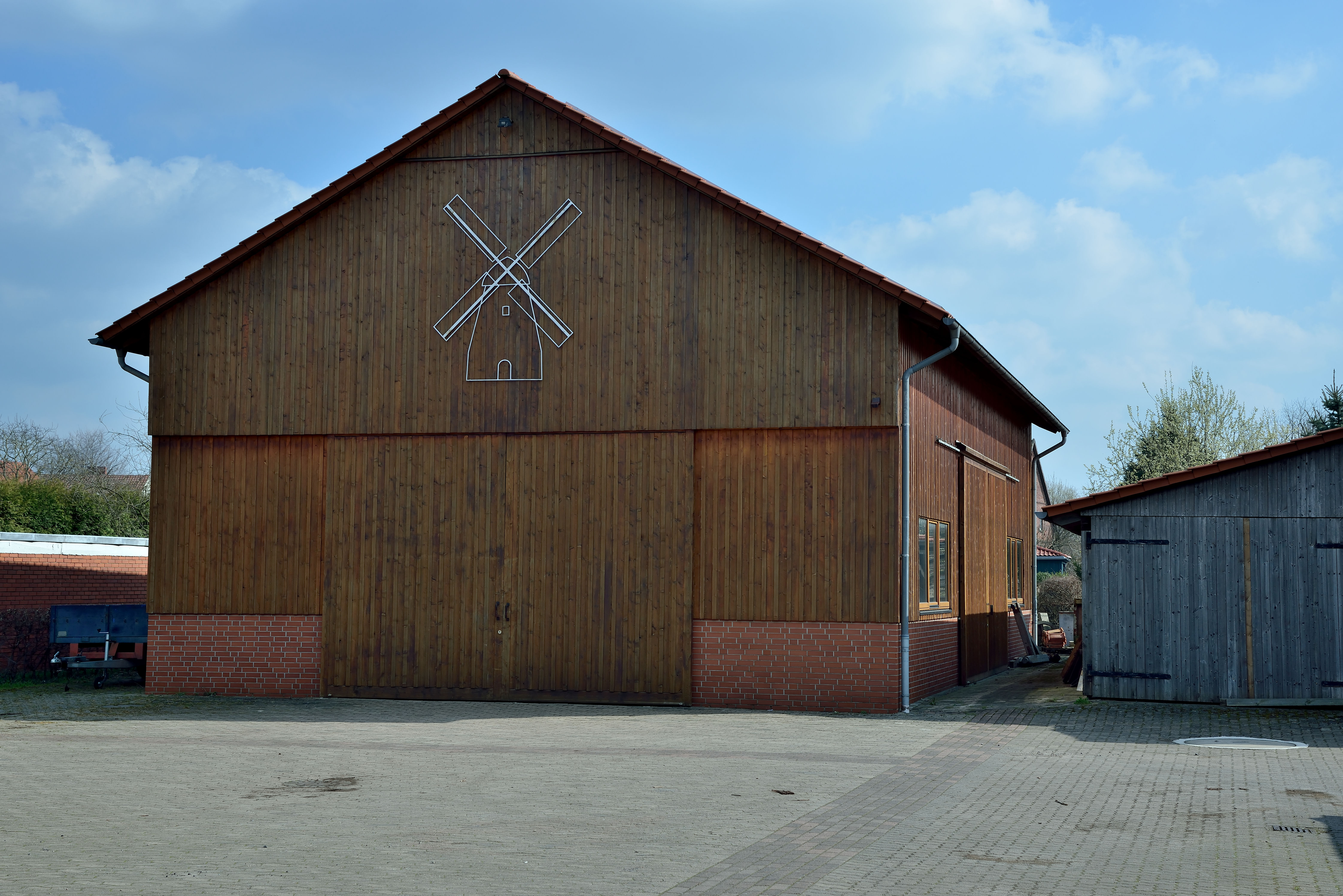 Mühlenverein im Kreis Minden-Lübbecke, Mühlenbauhof Petershagen-Frille